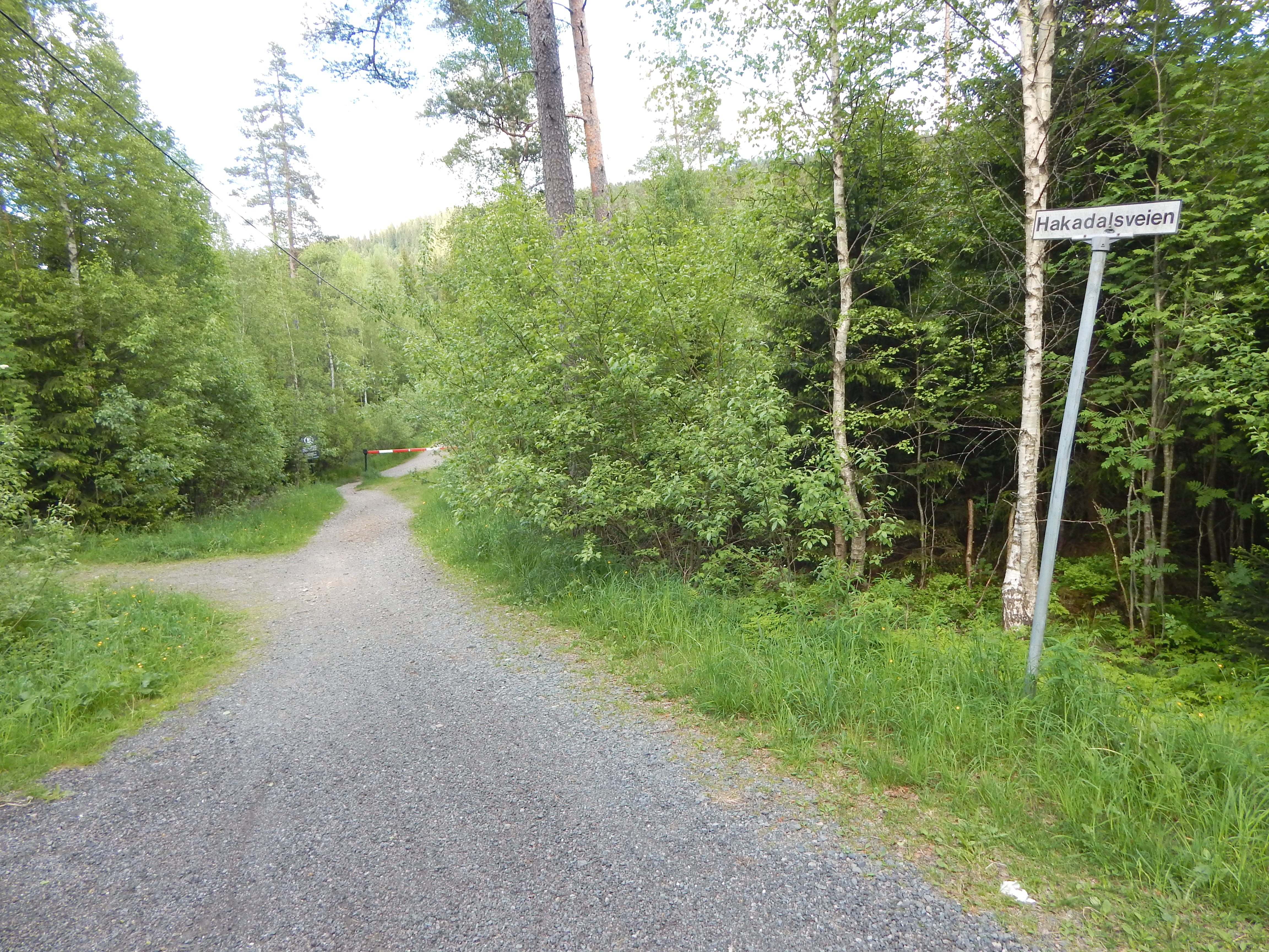 Hakadalsveien (eller Greveveien, avhengig av om man følger skilting eller kartverk)